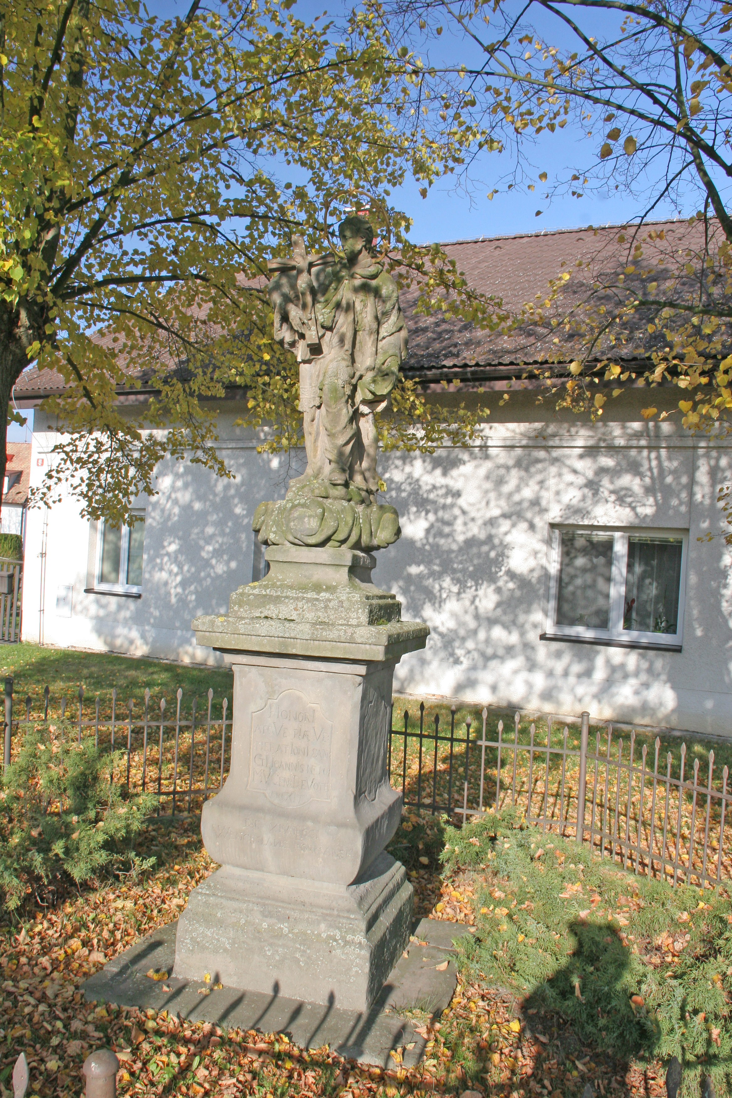 Podhráz svatý Jan Nepomucký